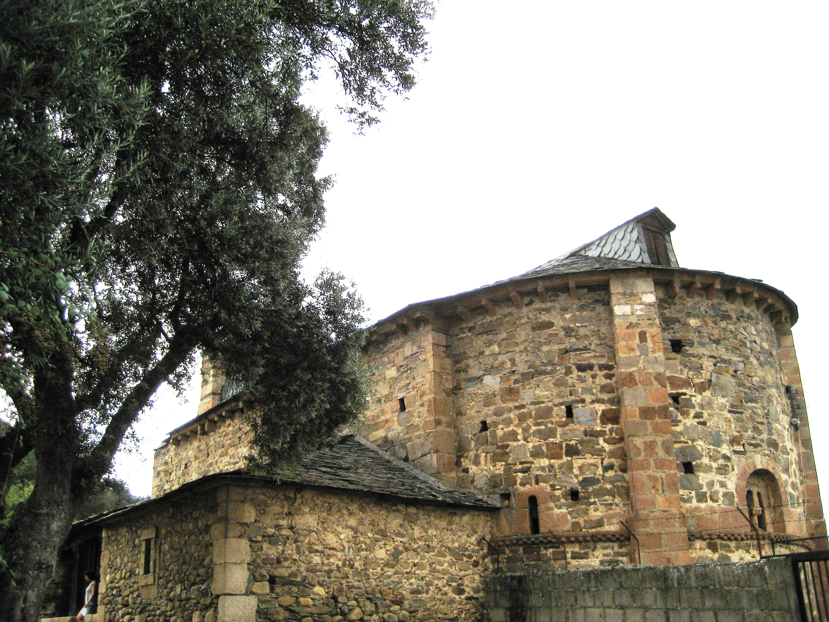 Iglesia románica de Santa maría de Vizbayo (Otero de Ponferrada)